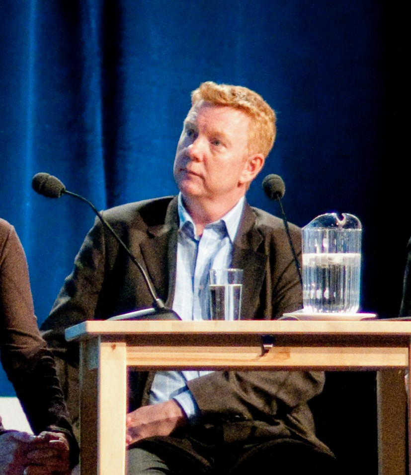 Foto: Chris Ronald Hermansen/Nordiske Mediedager